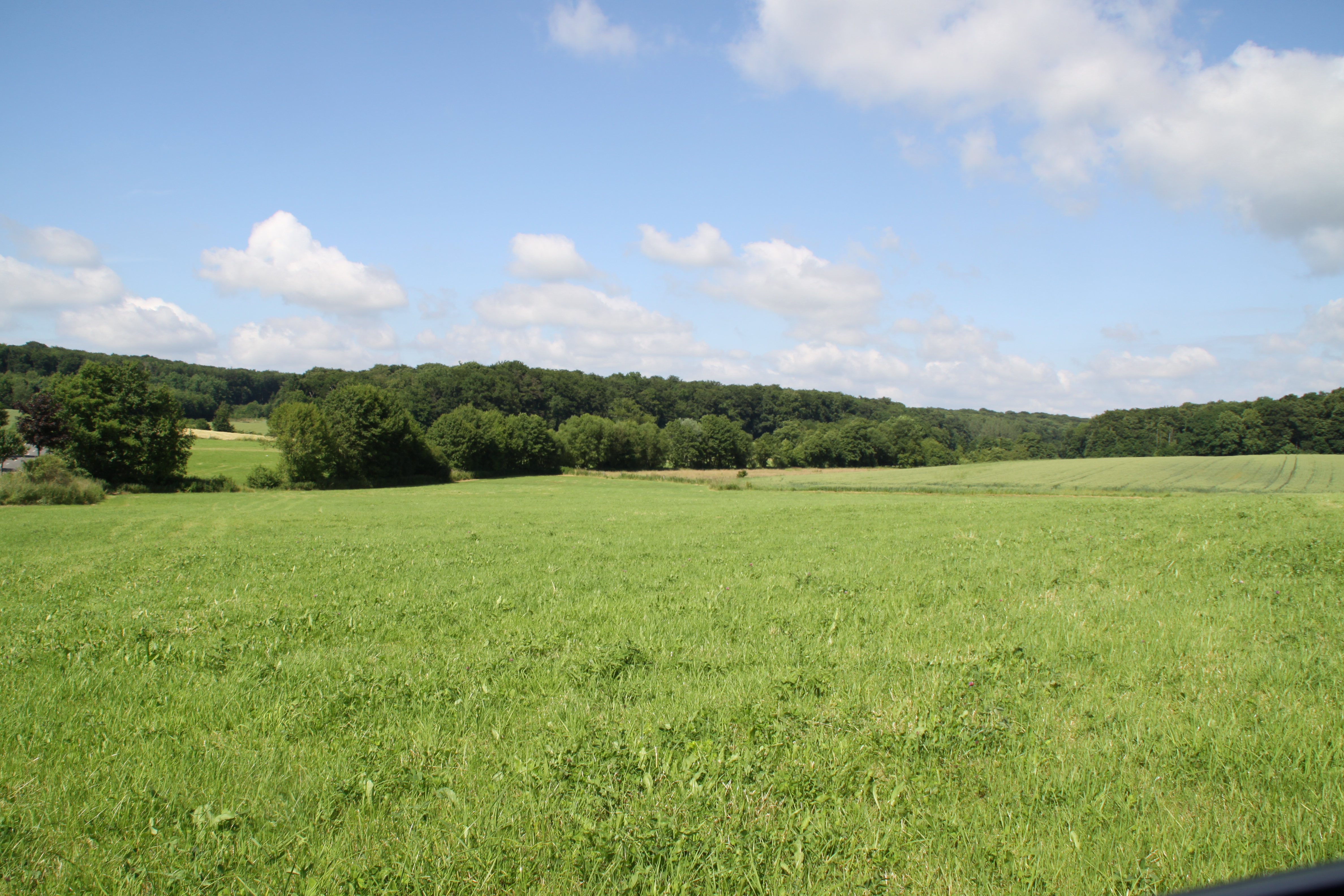 D'Wëlleschbaach op der Héicht vum fréieren Drécktipp vu Kënzeg hannendrun de Grasserbësch a Reifelswénkel